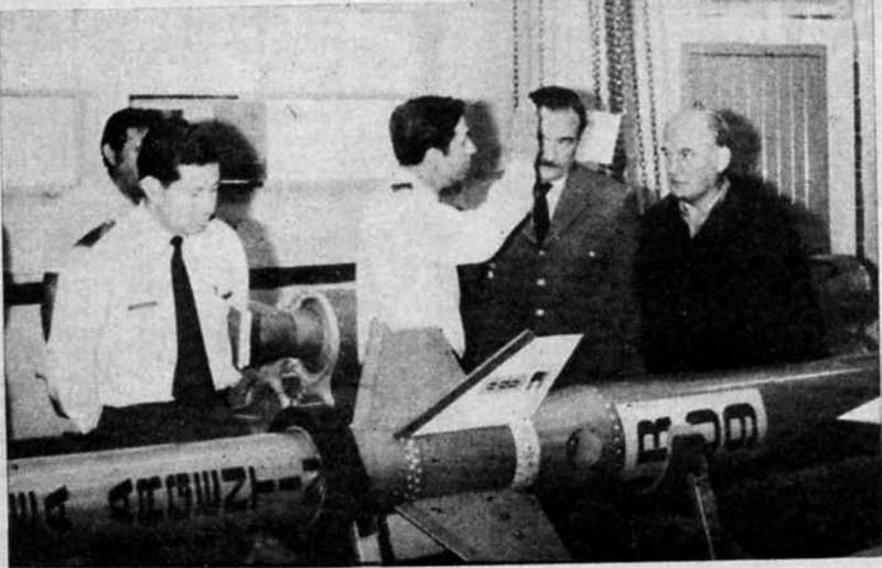 El cohete Rigel R-09, detrás se los puede ver a Cueto y Valenzuela.